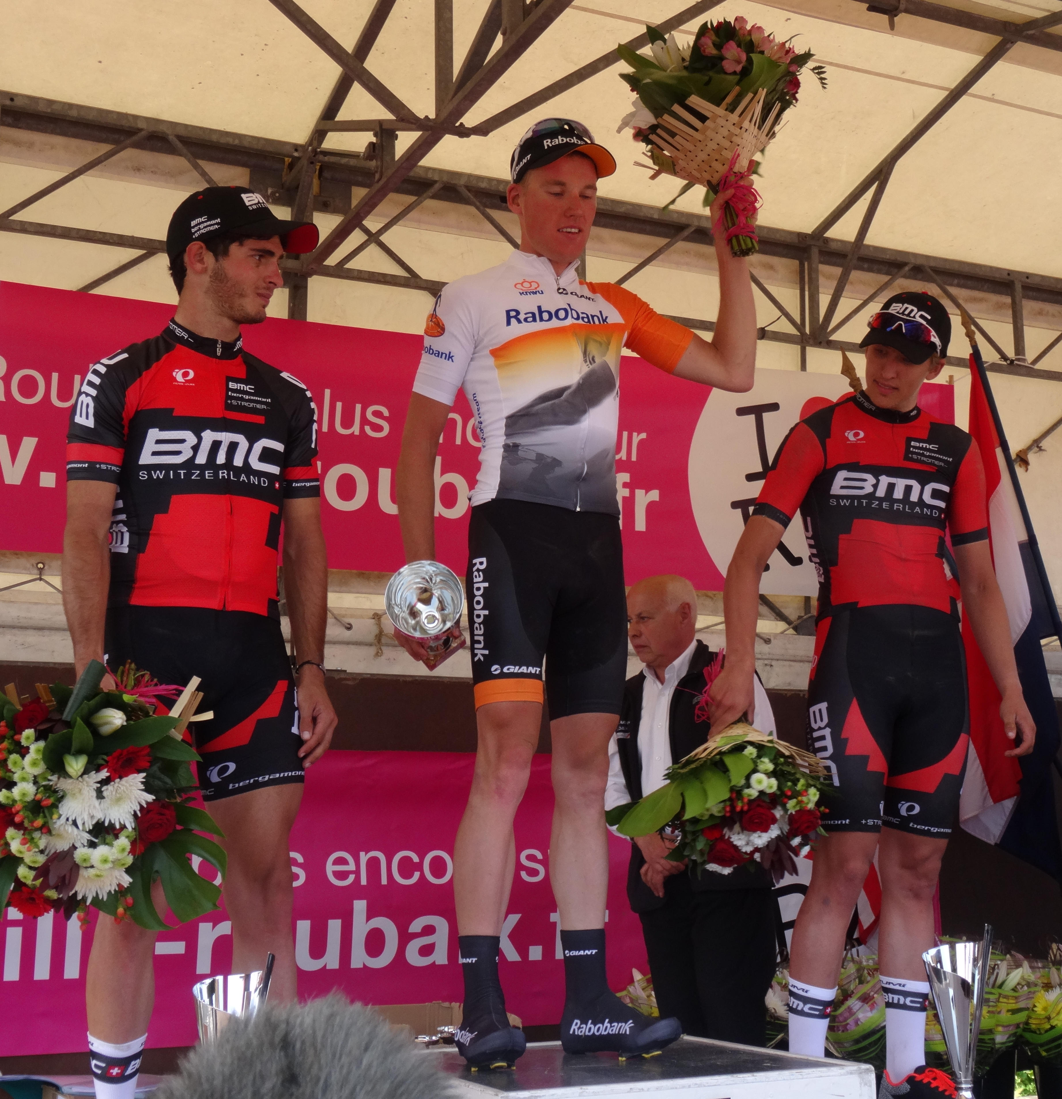 Reportage réalisé le dimanche 1er juin à l'occasion de l'arrivée du Paris-Roubaix espoirs 2014 au vélodrome André-Pétrieux à Roubaix, Nord, Nord-Pas-de-Calais, France.